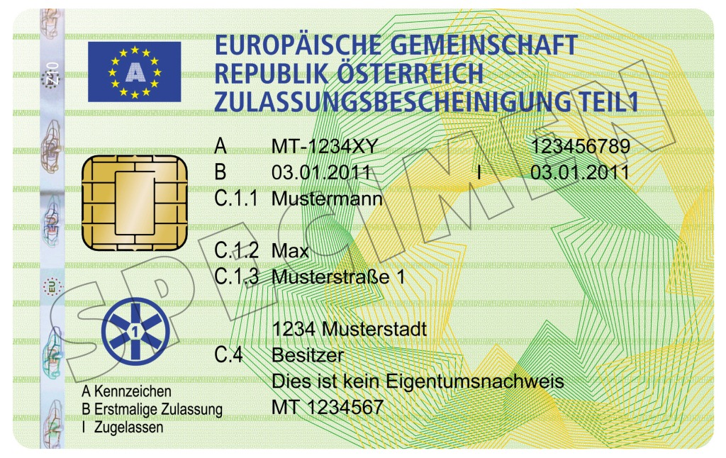 Vorderseite des österreichischen Zulassungsscheins im Scheckkartenformat